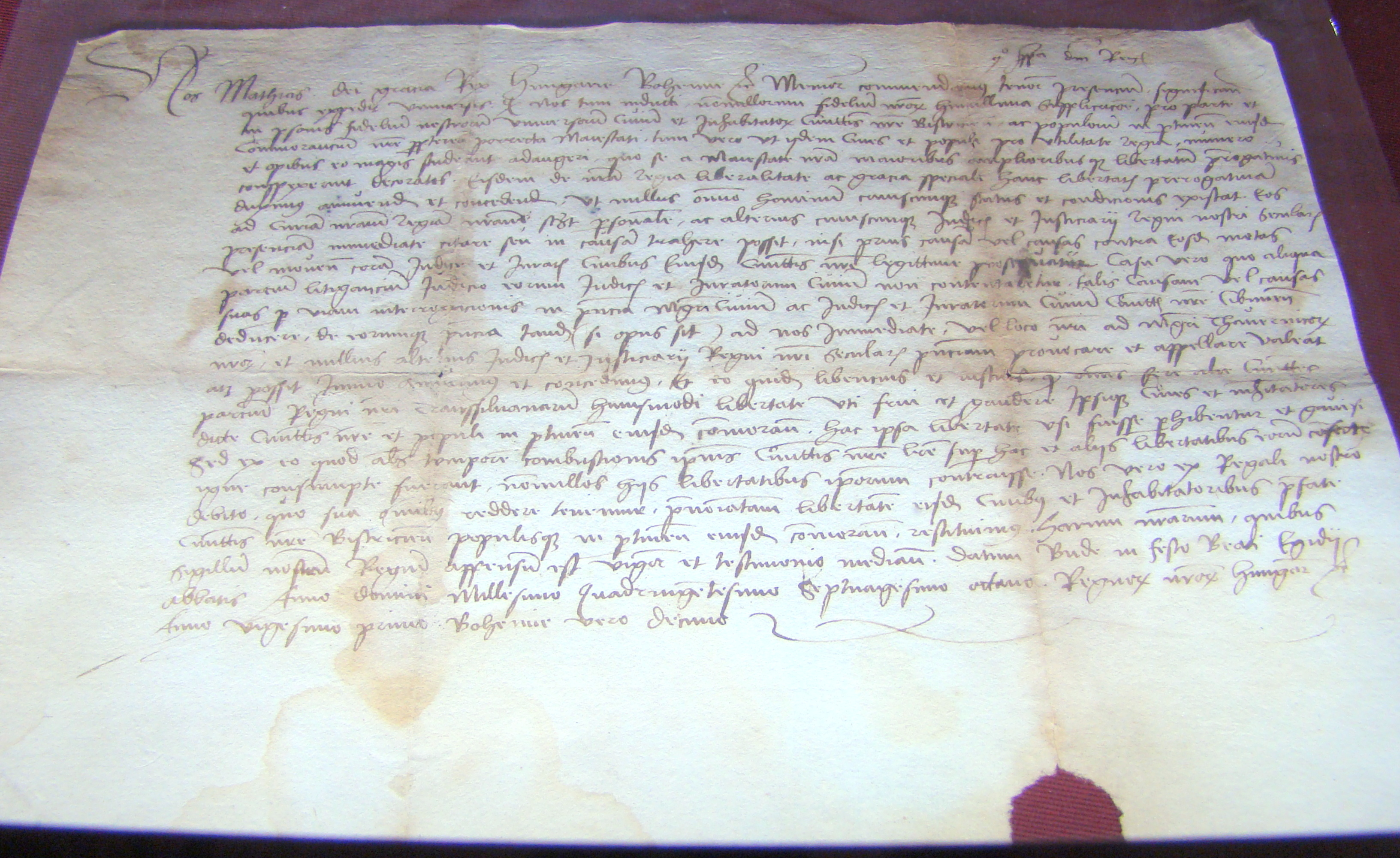 Muzeul grăniceresc năsăudean